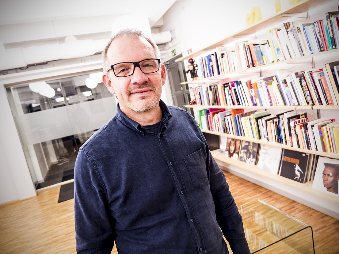 Örjan Nordling i entrén till FamiljenPangeas kontor i Stockholm. Foto: Kristoffer Elmqvist